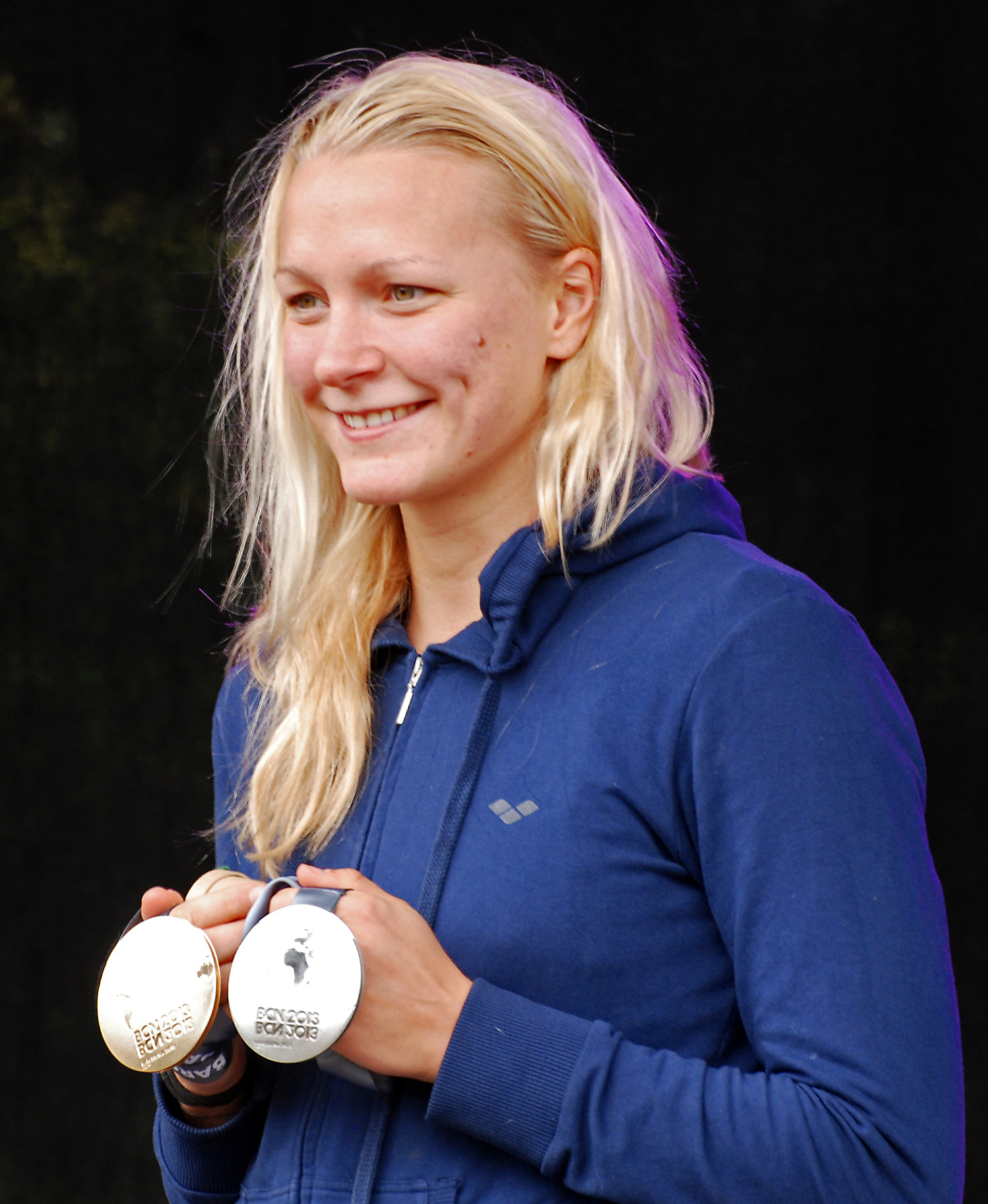 Sarah Sjöström visar upp sina två medaljer från VM i Barcelona 2013 vid en hyllning på Haningedagen vid Rudans gård 17 augusti 2013.